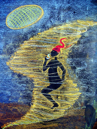 Representação em desenho do personagem Saci.